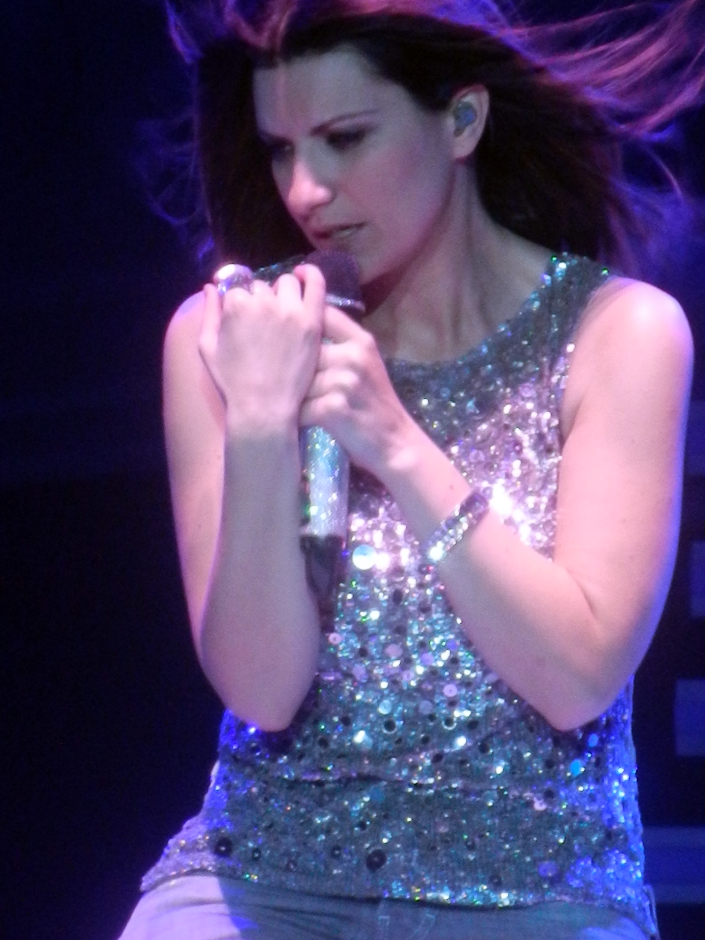 Laura Pausini 19 - Bercy - Avril 2012